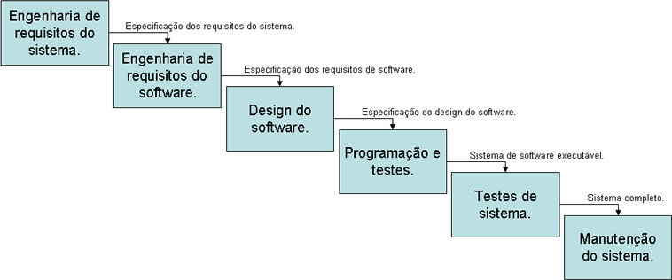 Diagrama feito por mim.